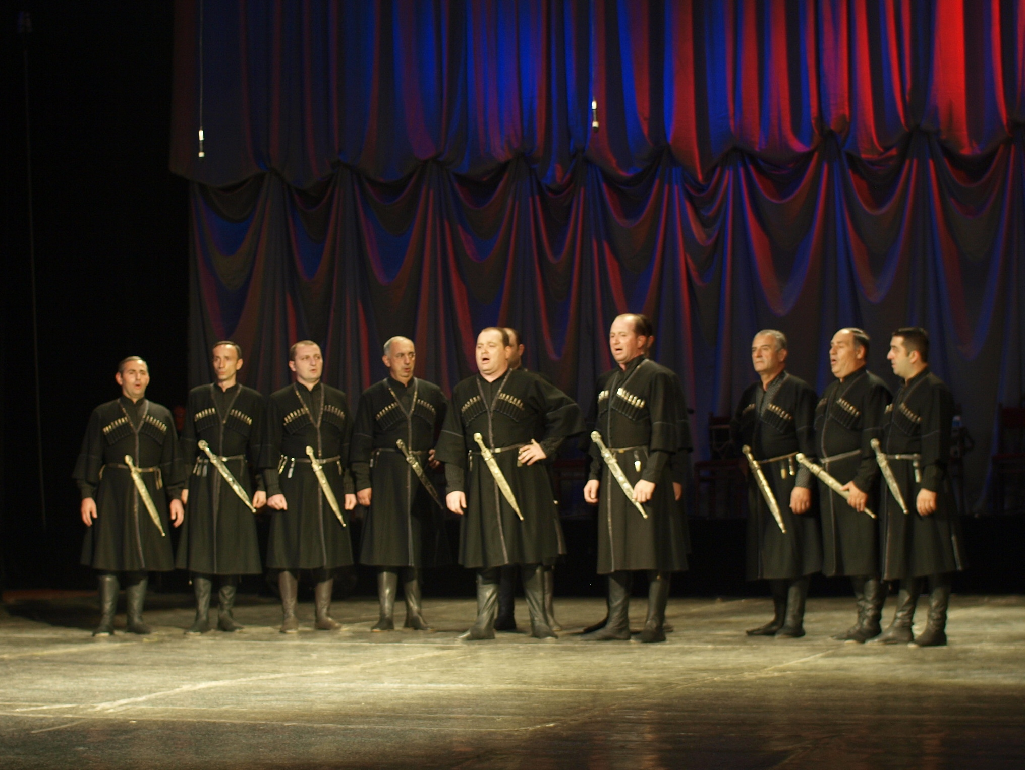 Batumi - Georgian Folk Singers